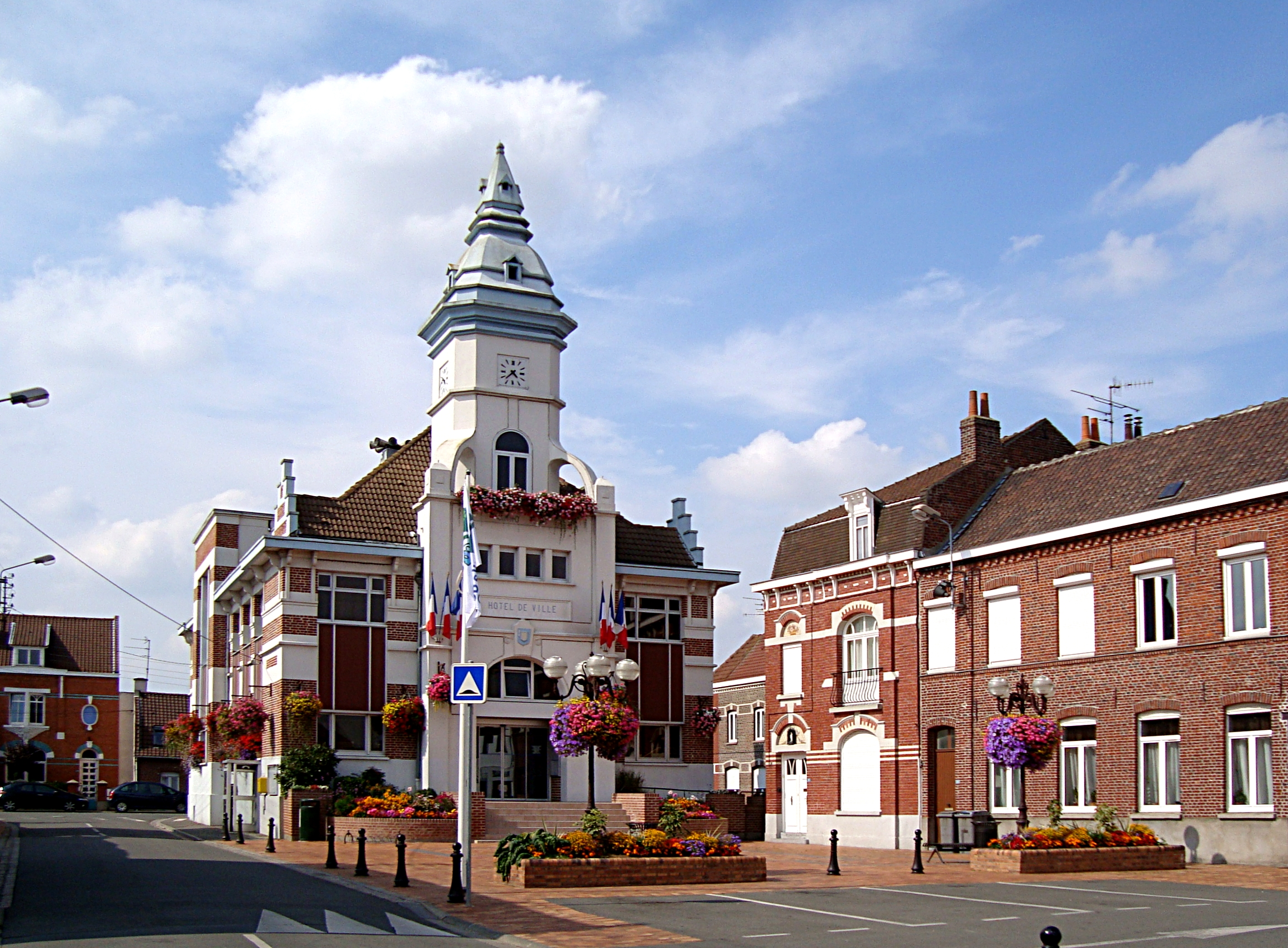 L'hôtel de ville de Wavrin (Nord).